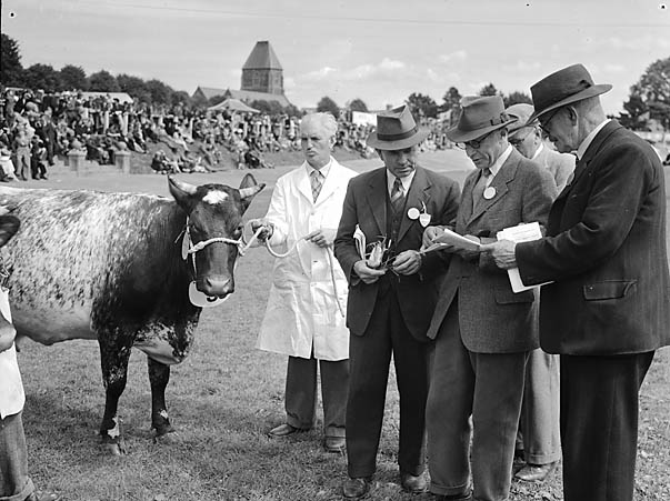 Teitl Cymraeg/Welsh title: Sioe Caerfyrddin 1951 Ffotograffydd/Photographer: Geoff Charles (1909-2002) Dyddiad/Date: 24/8/1951 Cyfrwng/Medium: Negydd ffilm / Film negative Cyfeiriad/Reference: (gch02107) Rhif cofnod / Record no.: 003368252 Rhagor o wybodaeth am gasgliad Geoff Charles yn Llyfrgell Genedlaethol Cymru More information about the Geoff Charles Collection at the National Library of Wales Mae ffotograffau Geoff Charles hefyd yn rhan o Broject Europeana Libraries Geoff Charles' photographs also form part of the Europeana Libraries Project